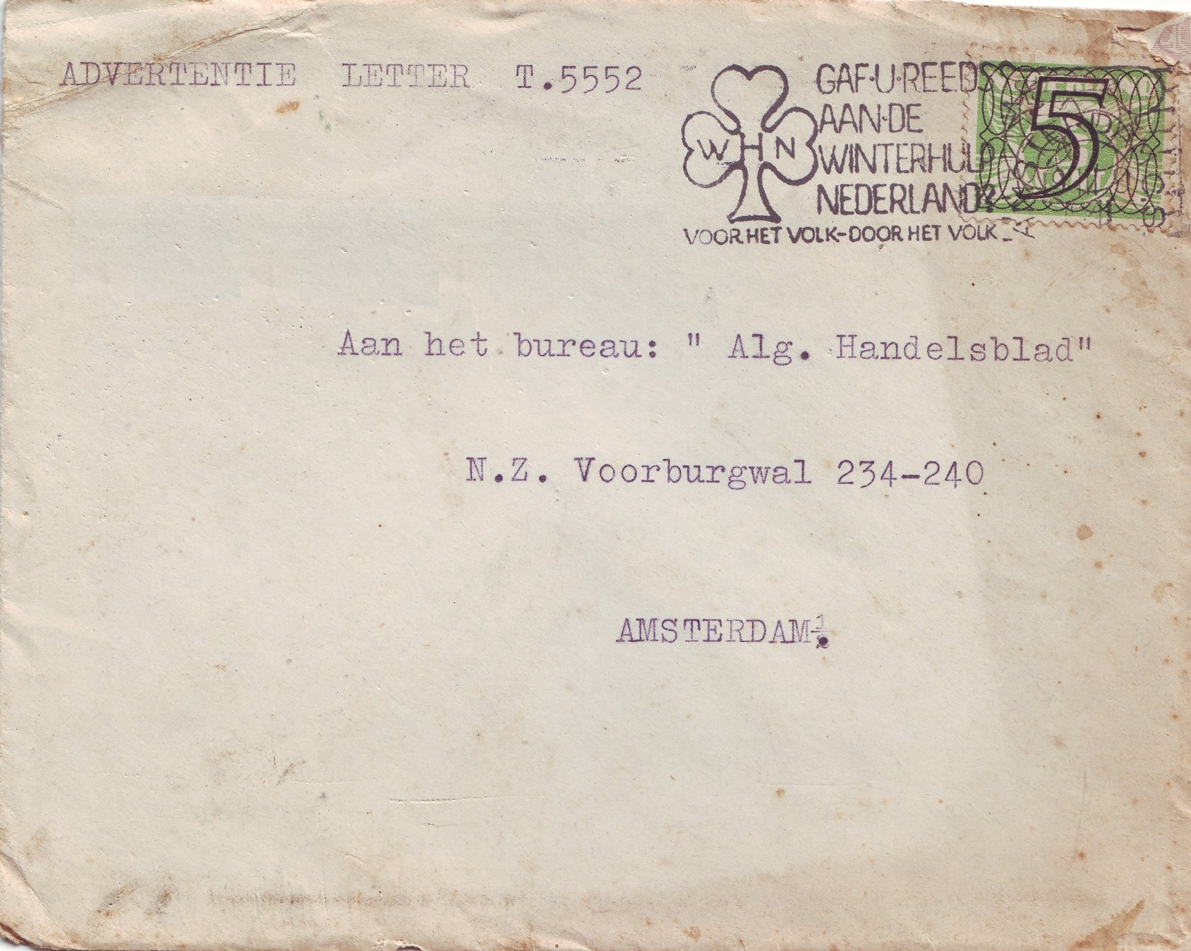 Lokale brief binnen Amsterdam, 9 maart (1941) met machinestempel met stempelvlag "Gaf u reeds aan de Winterhulp Nederland? Voor het volk - Door het volk"